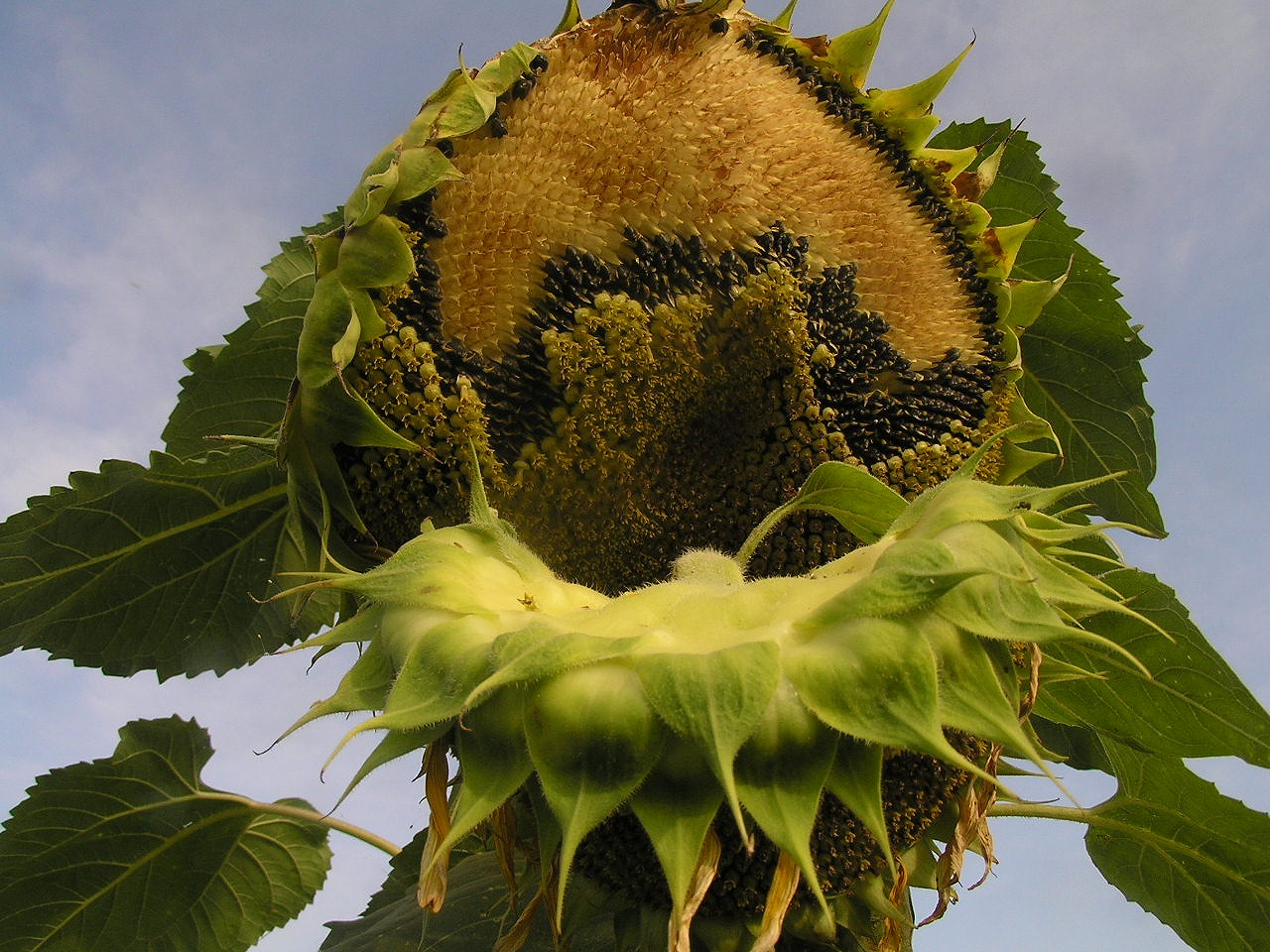 枯れたヒマワリの花